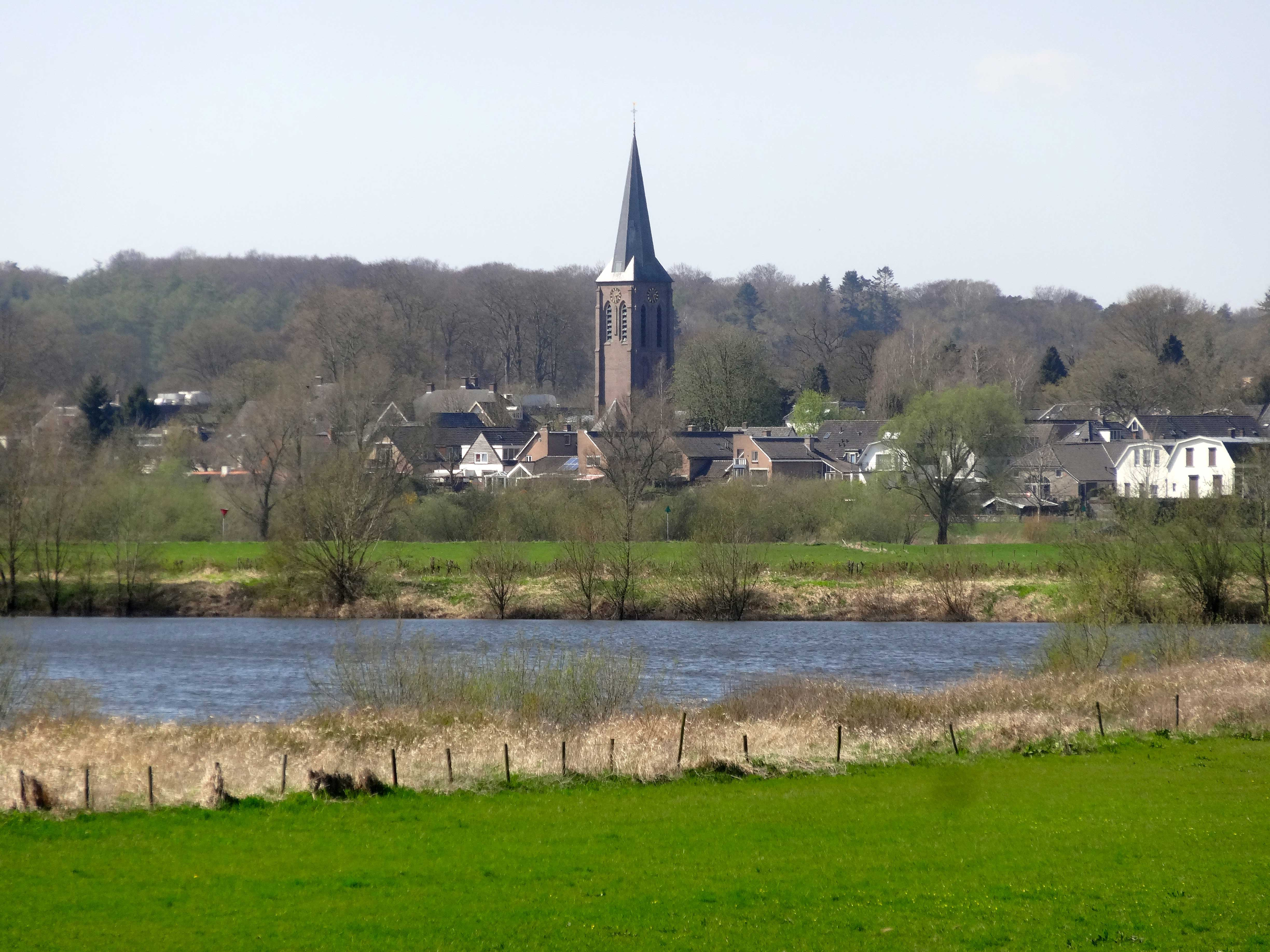 Zicht op Dieren met de Dierense toren